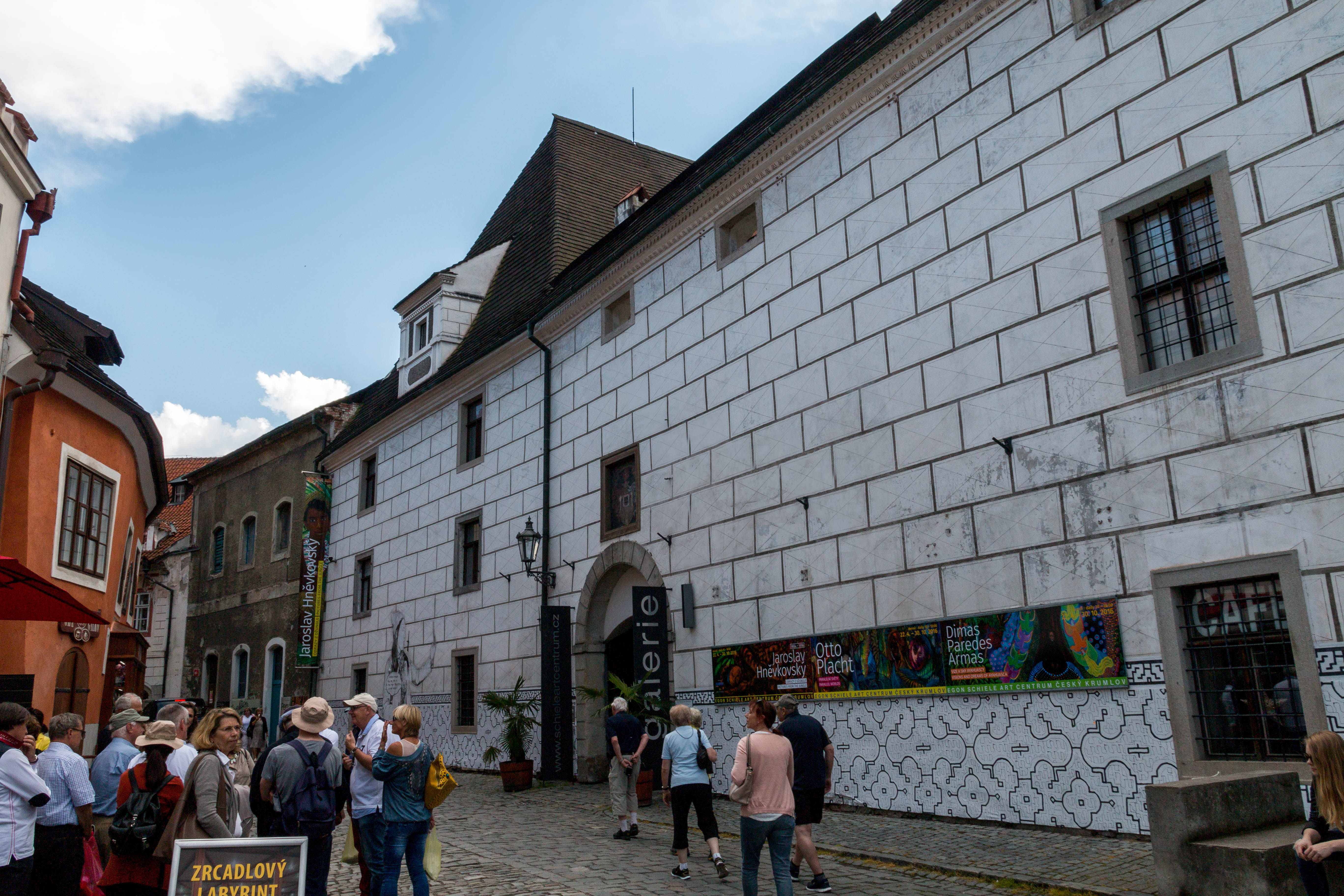 Egon Schiele Art Centrum